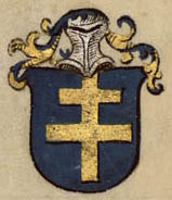 Беларуская (тарашкевіца): Герб Ягайлы (Jagajła) Бойча (Bojča)